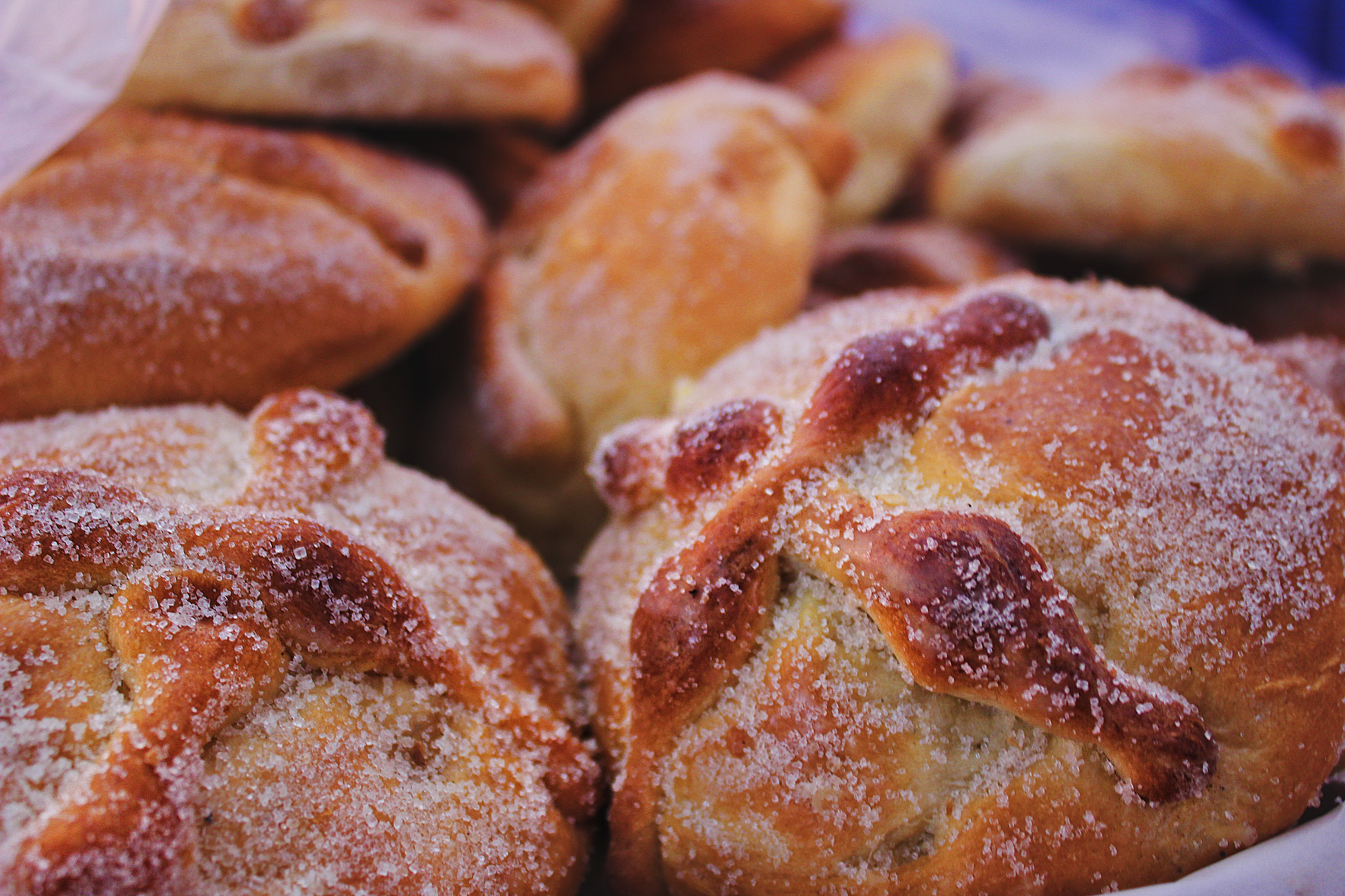 Pan de muerto, postre típico mexicano de la época de día de muertos. Mercado de Coyoacán, Coyoacán, CDMX.